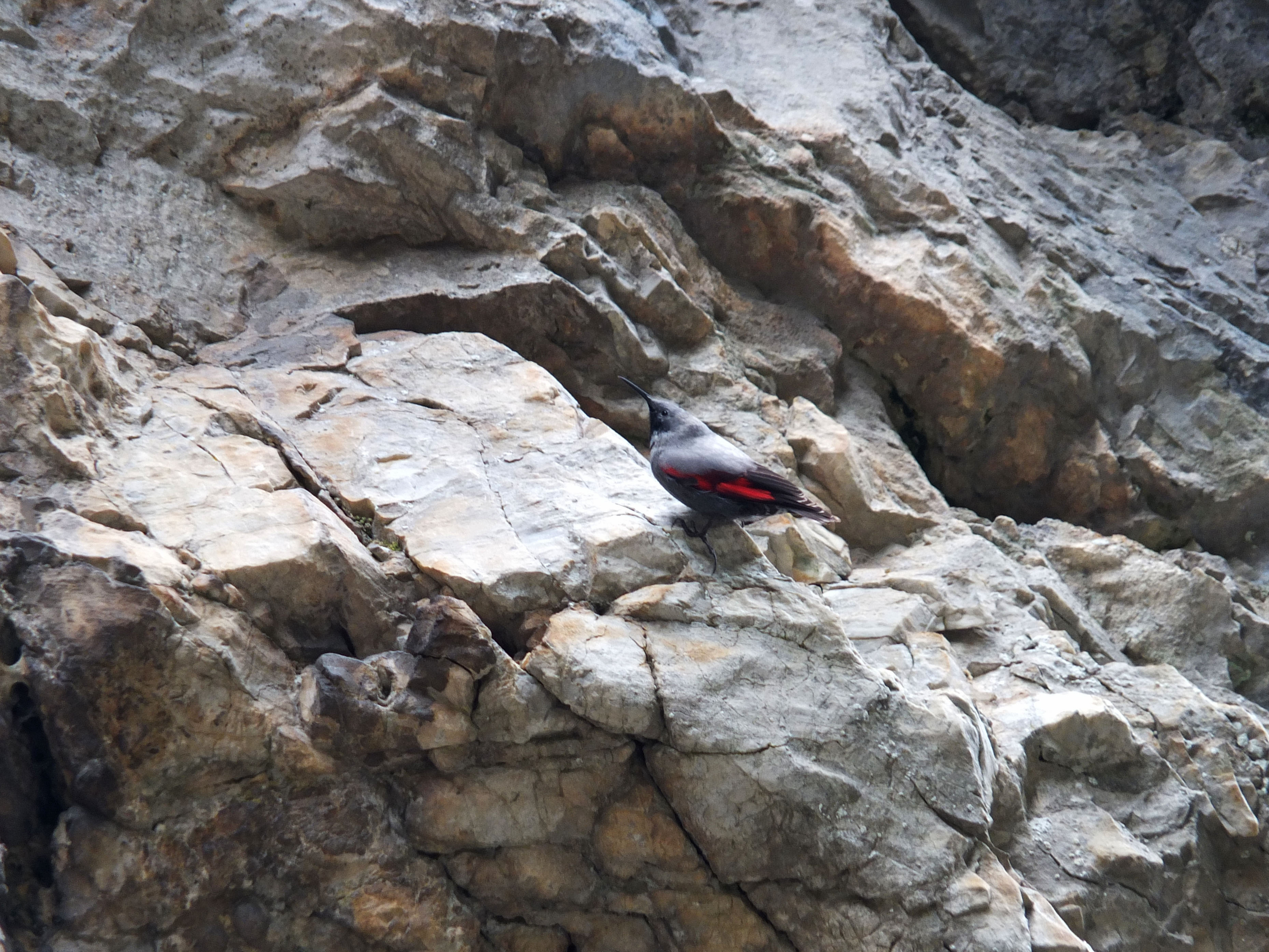 Триградското ждрело, Мъжка скалолазка (Tichodroma muraria) в Триградското ждрело